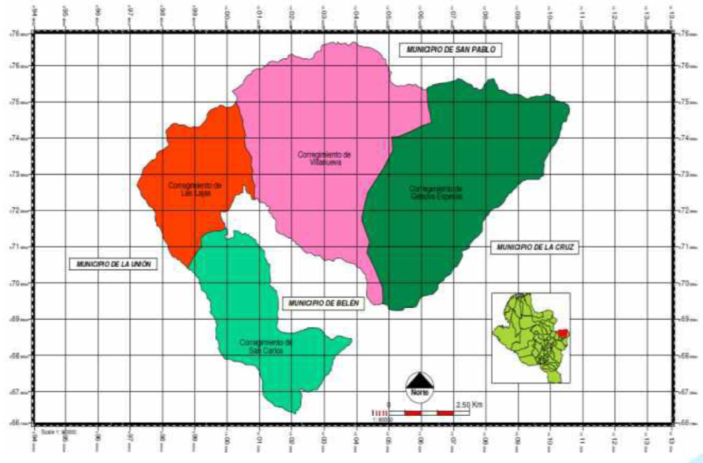 Georeferencia Colón Génova.